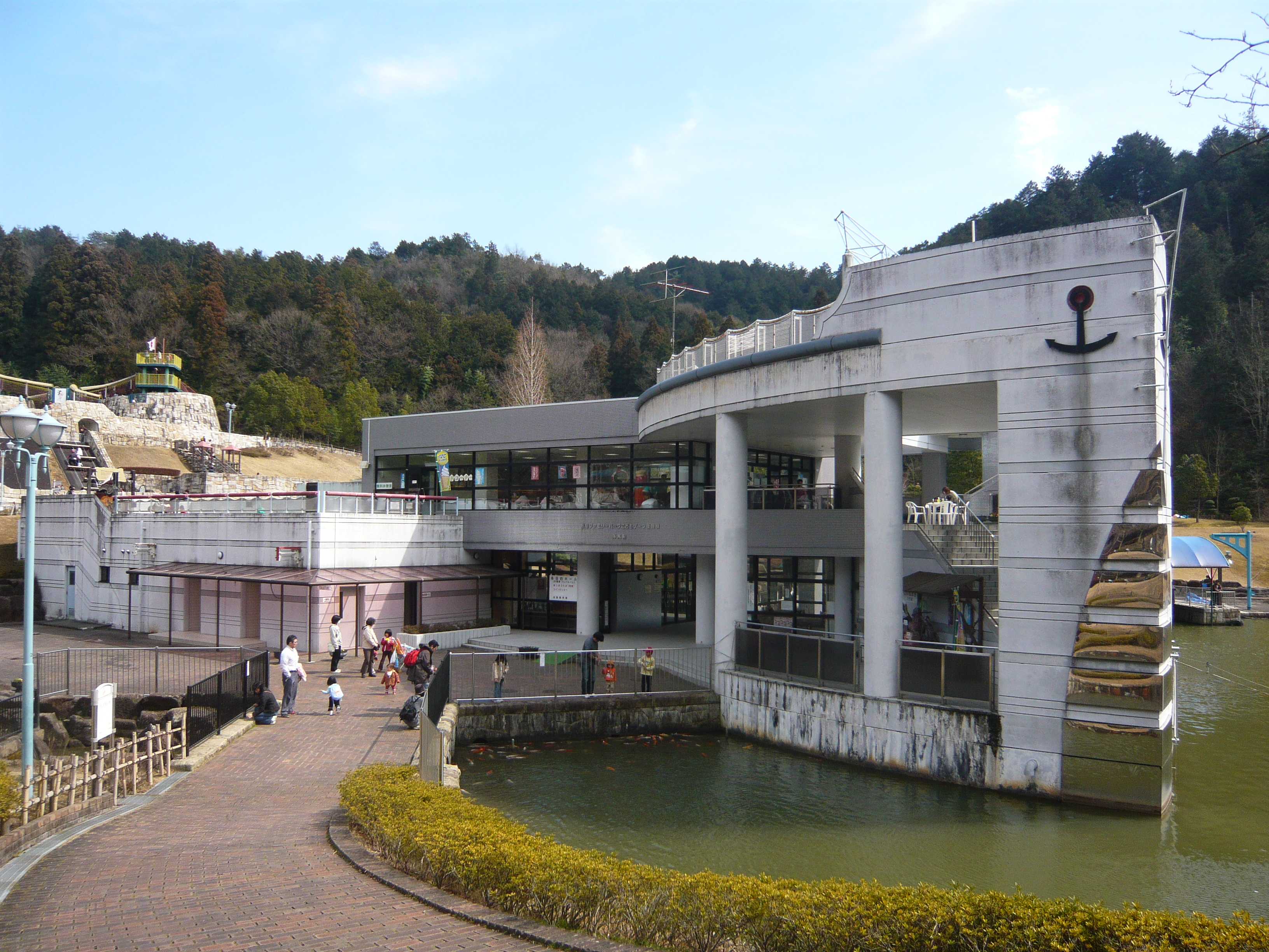 Gifu Family Park こどもゾーン管理棟（岐阜ファミリーパーク）,Gifu,Gifu,Japan（岐阜県岐阜市）で撮影。